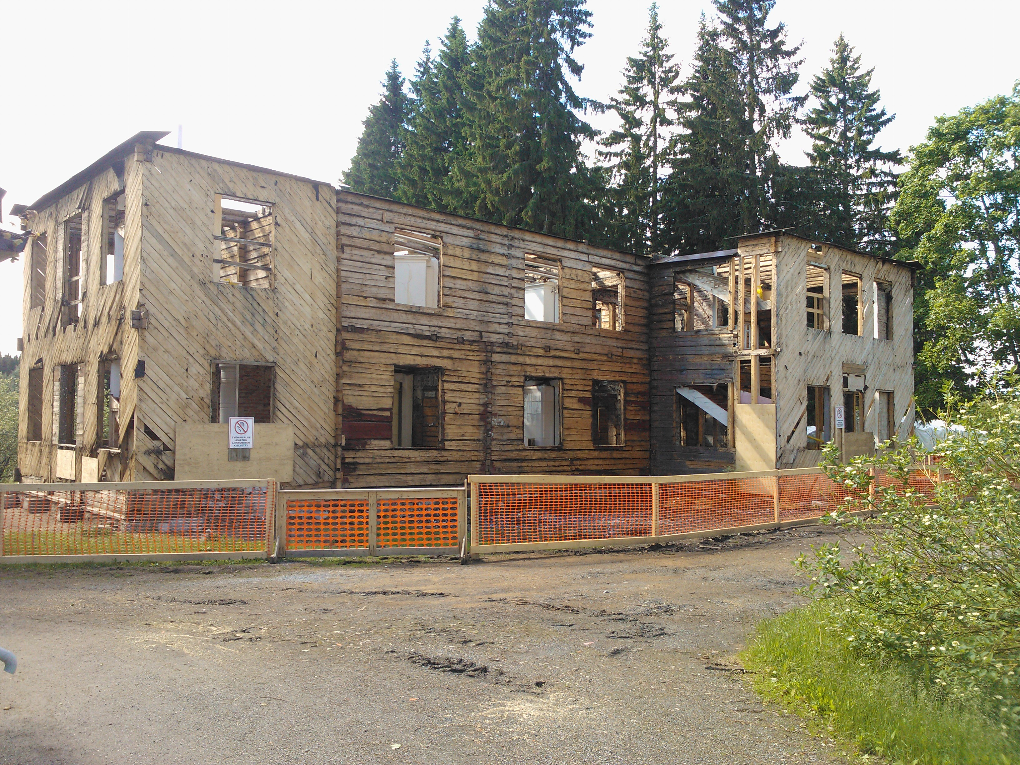 Ново-Валаамский монастырь. Дом настоятеля после пожара (18 марта 2011)